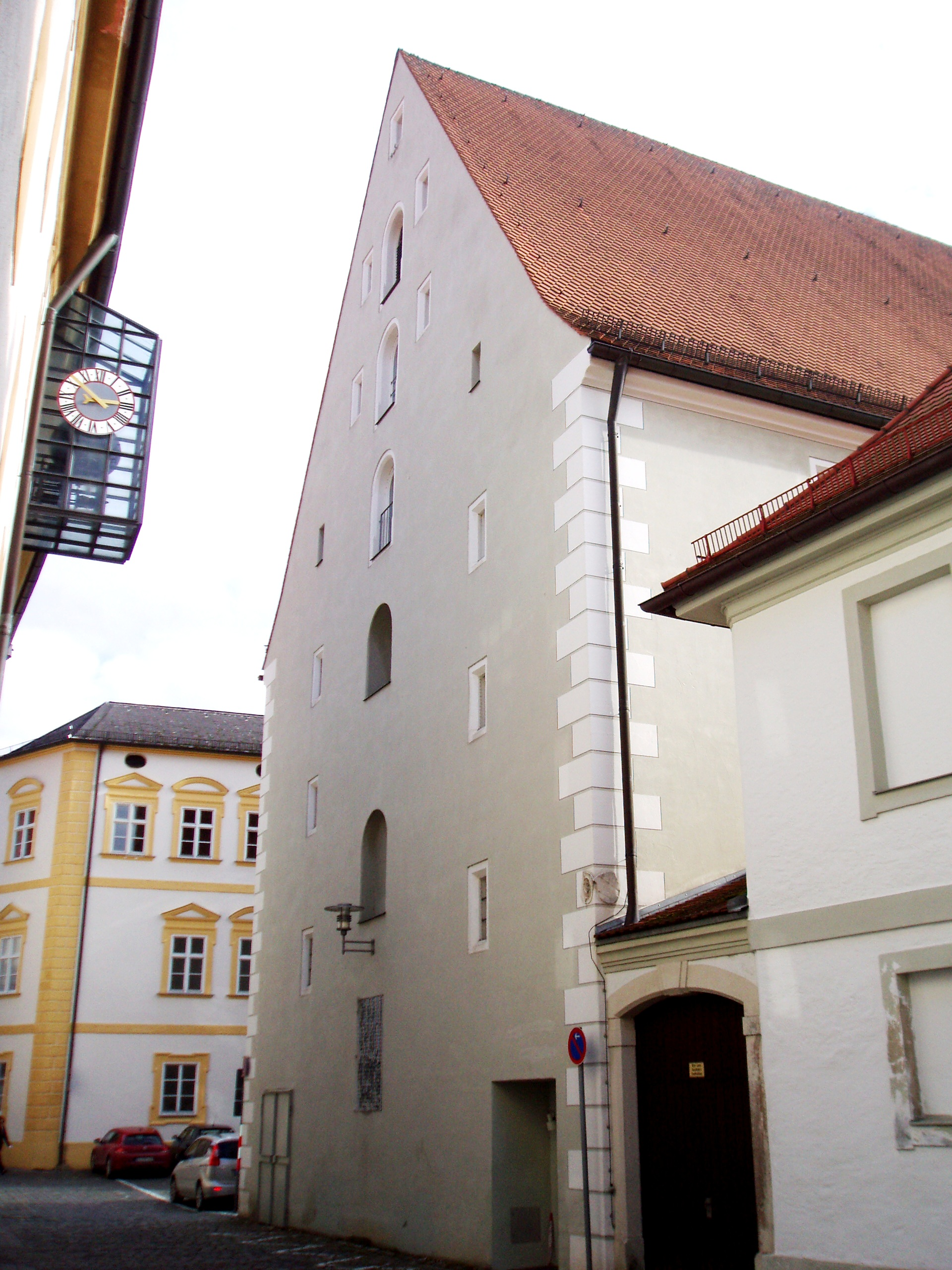 Huttenstadel_Eichstätt,_nördliche_Giebelseite_heute